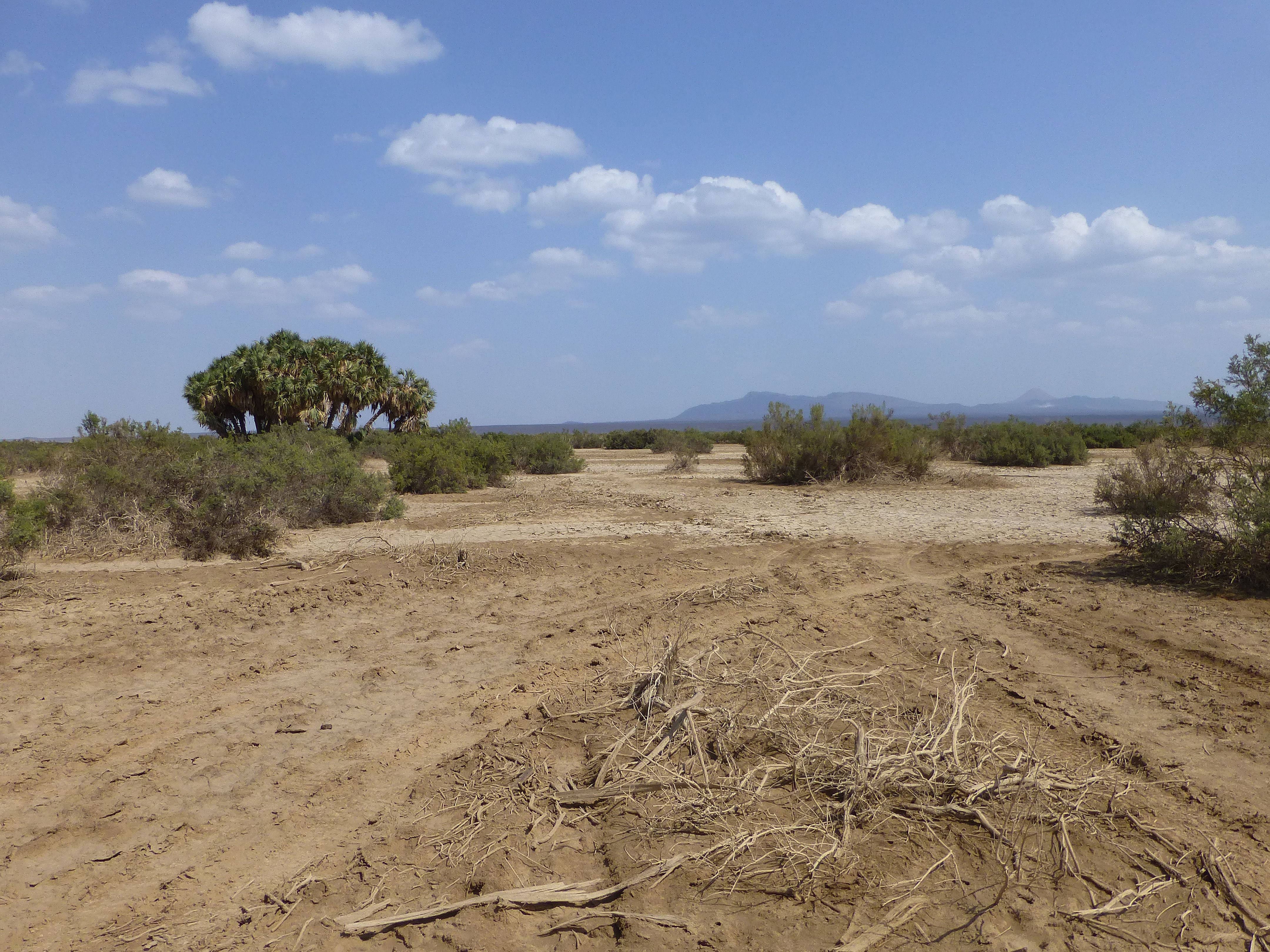 Végétation dans le Danakil (Ethiopie)